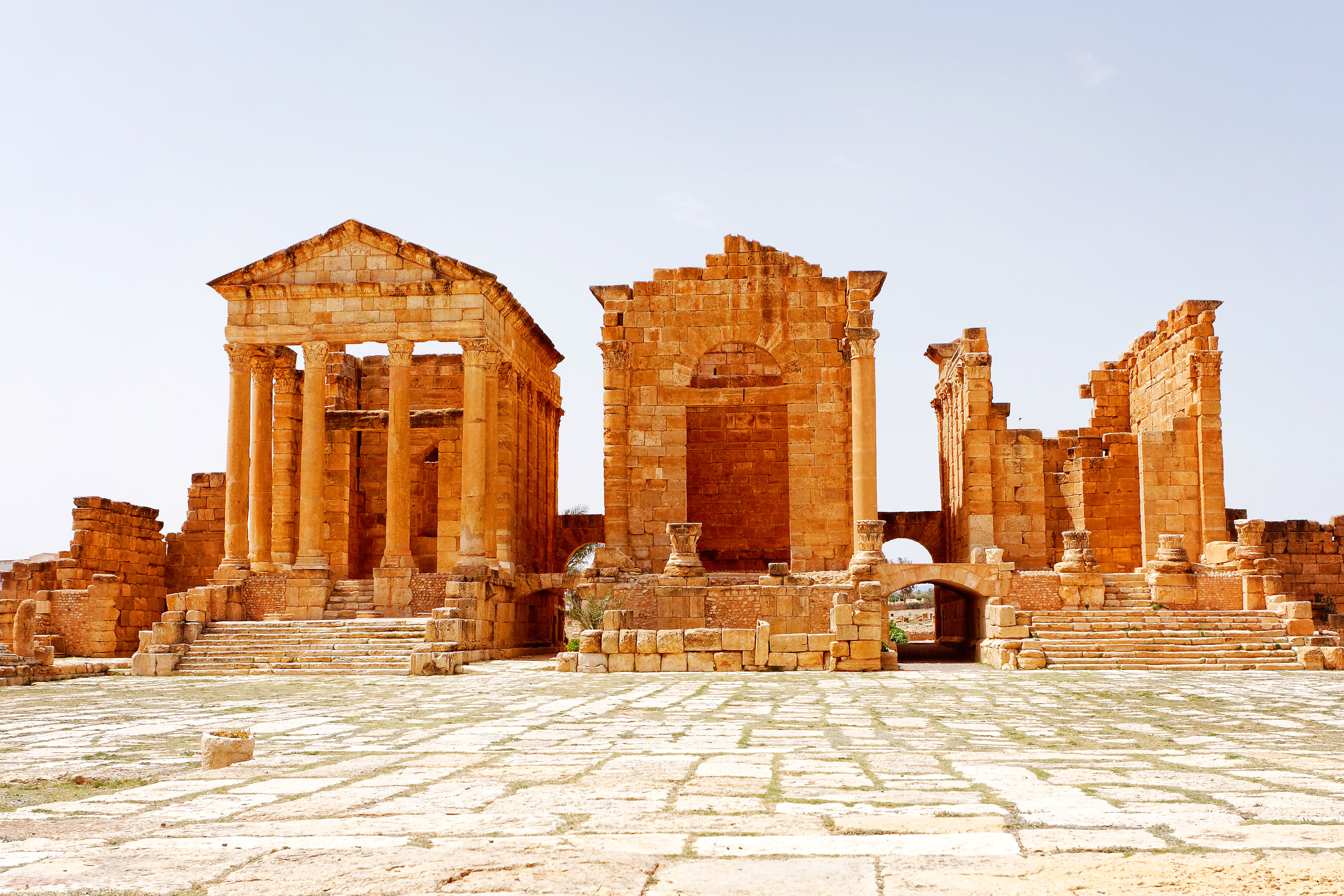 Trois temples, Sbeïtla